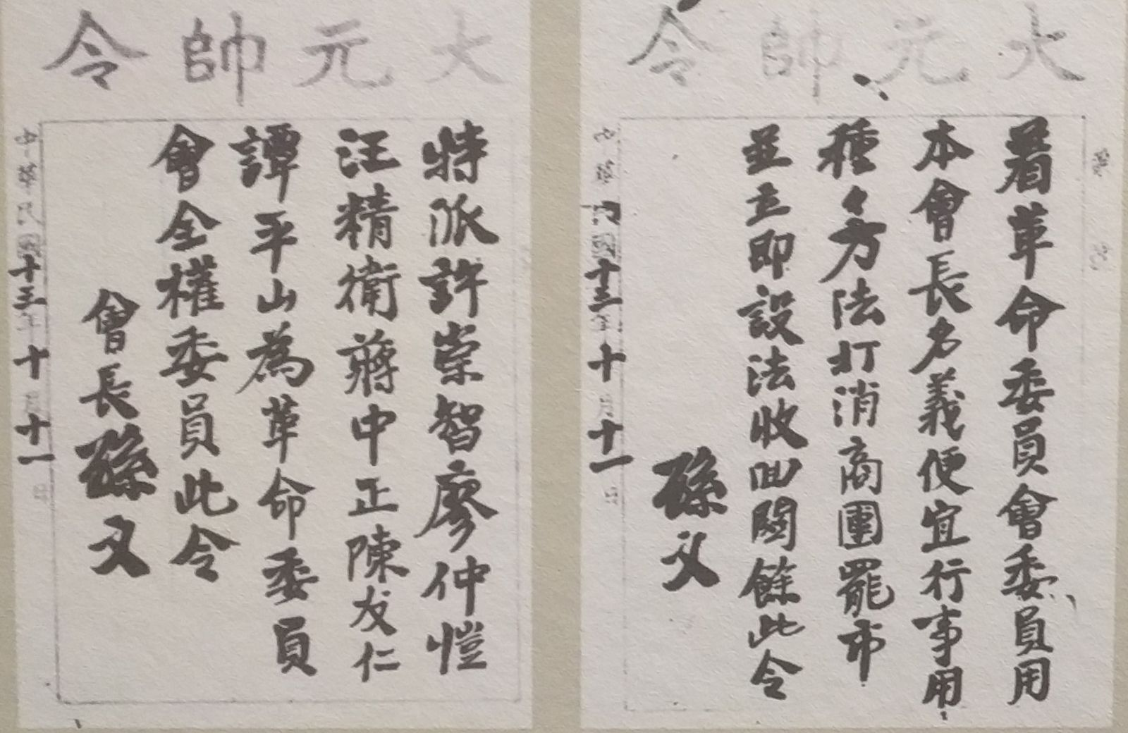 孙中山关于镇压商团的手令